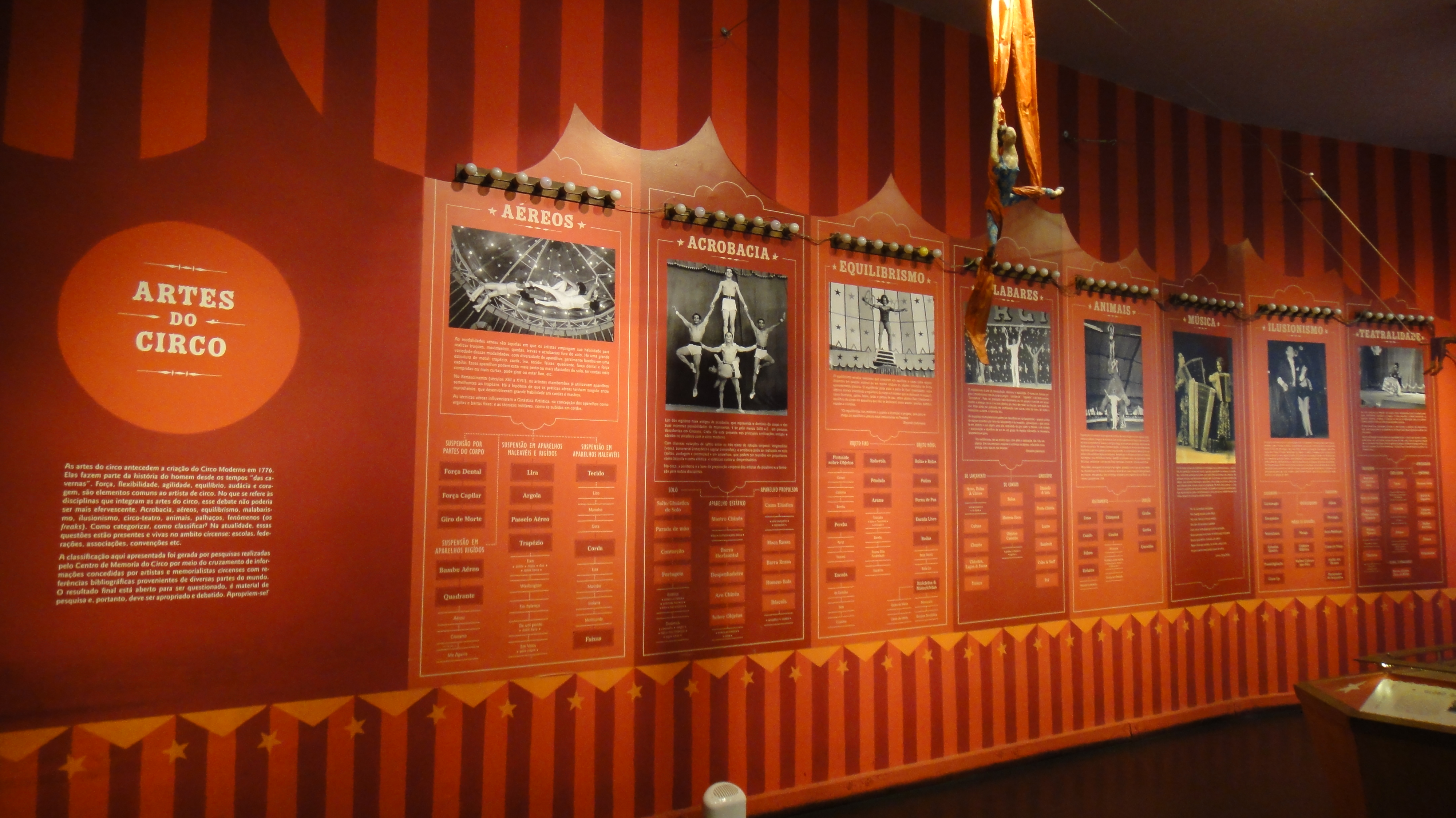 Sala de baixo do Centro de Memória do Circo